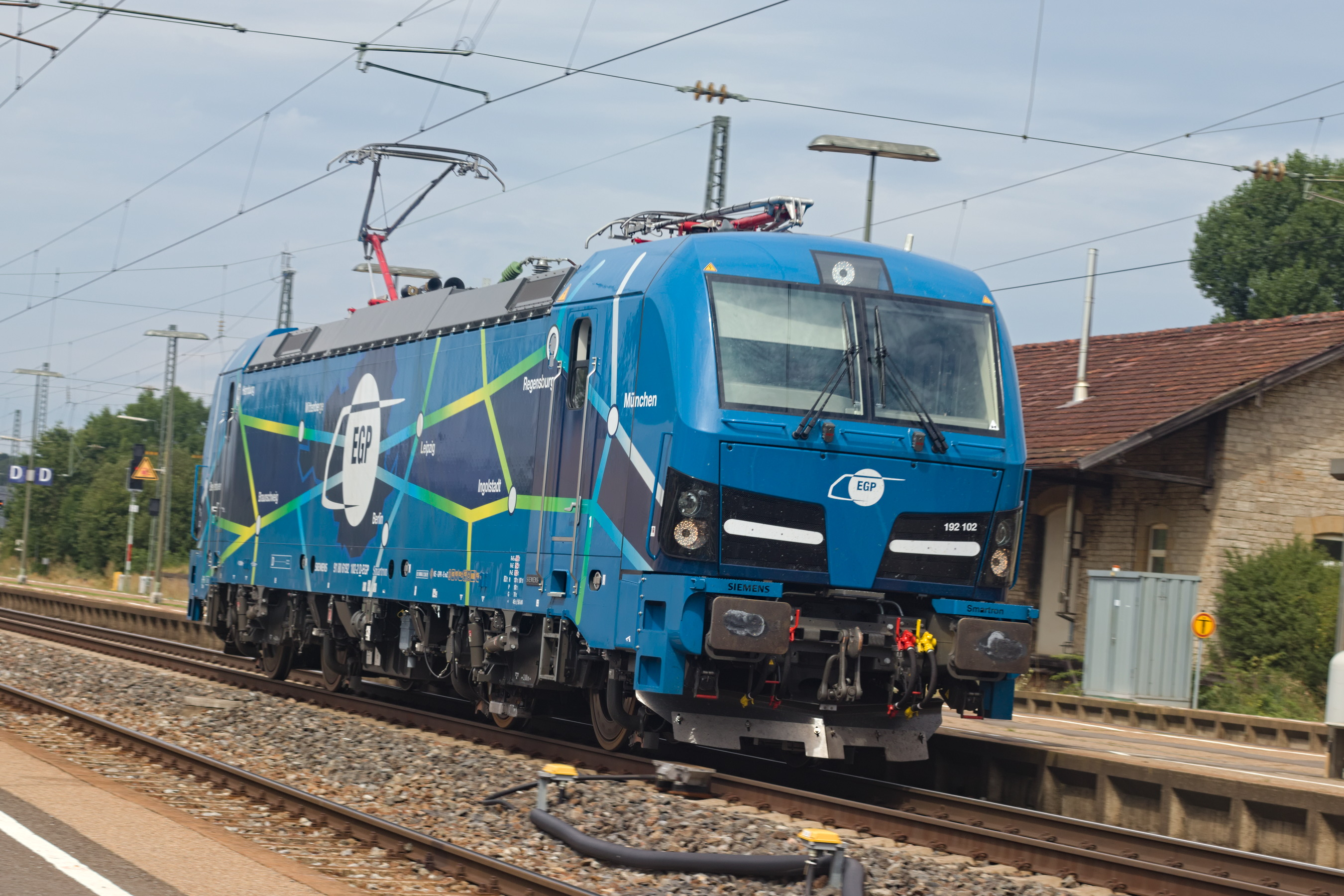 EGP 192 102 fährt durch Steinach.